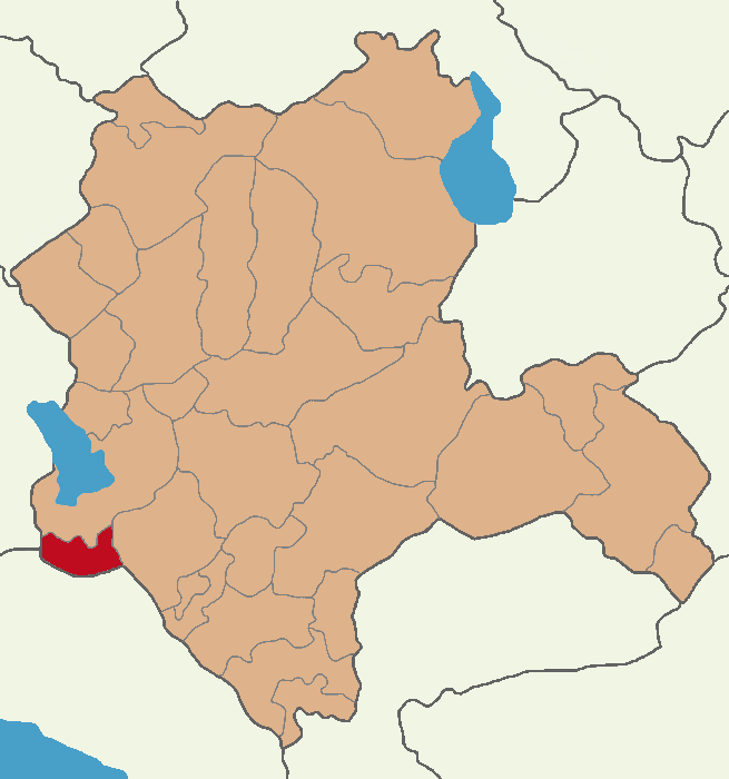 Derebucak ilçesinin konumu